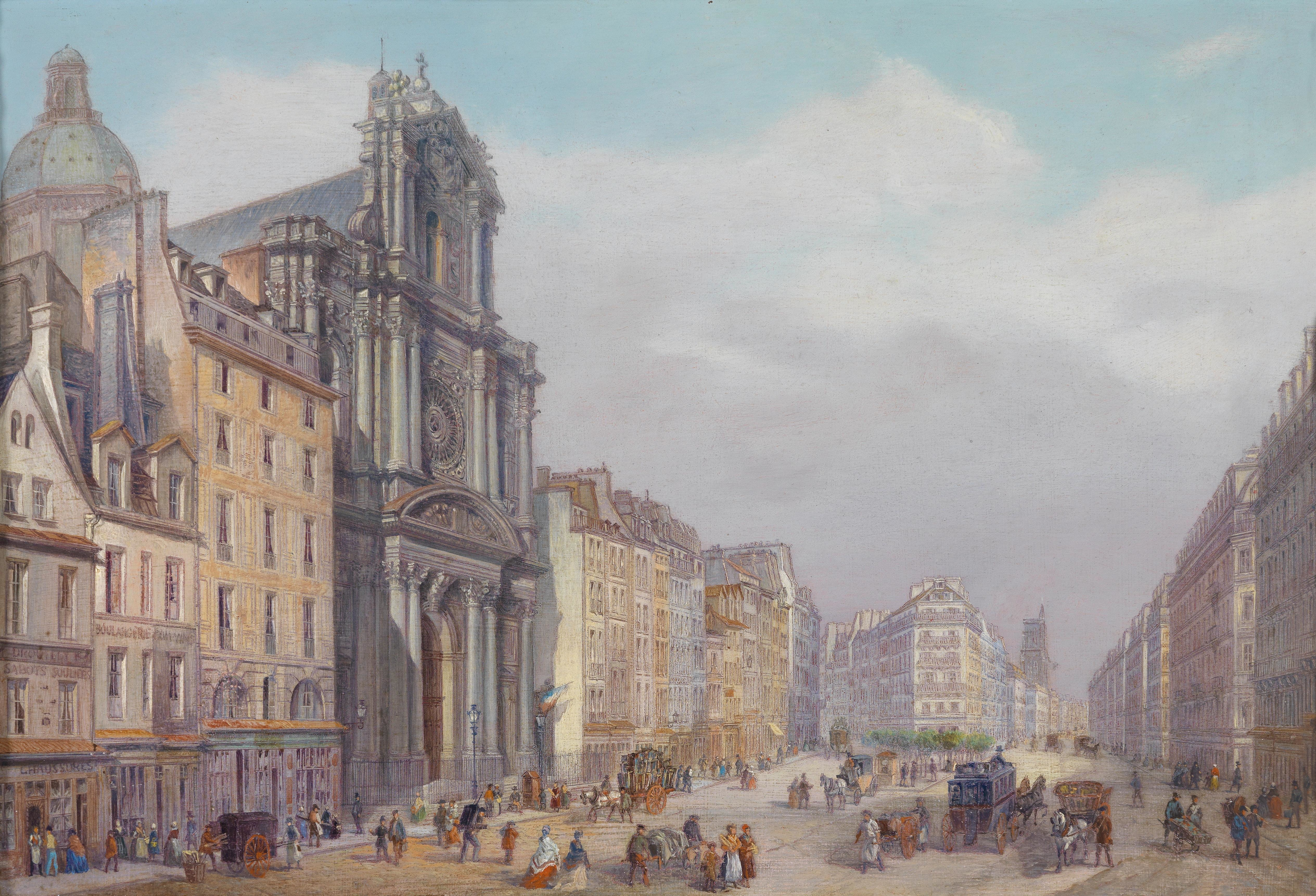 Blick auf die Rue Saint-Antoine, Paris, Öl auf Metall, 25 x 36 cm